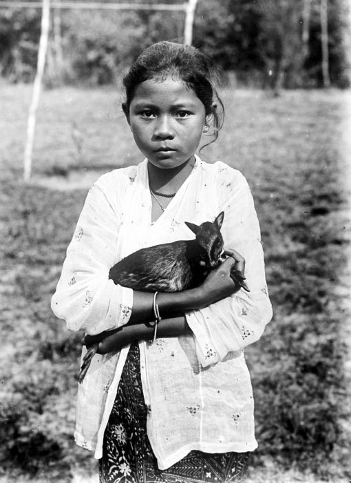 Repronegatief. Een meisje met een pelanduk (dwerghertje), Billiton